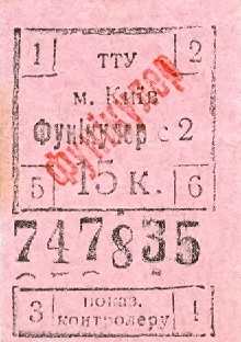 Квиток на фунікулер (1950-і)